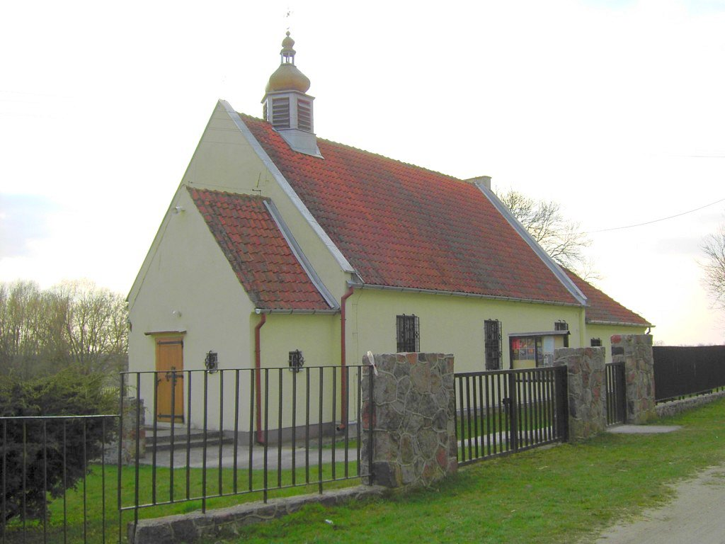 Bajory Małe - cerkiew greckokatolicka pw. Ofiarowania NMP